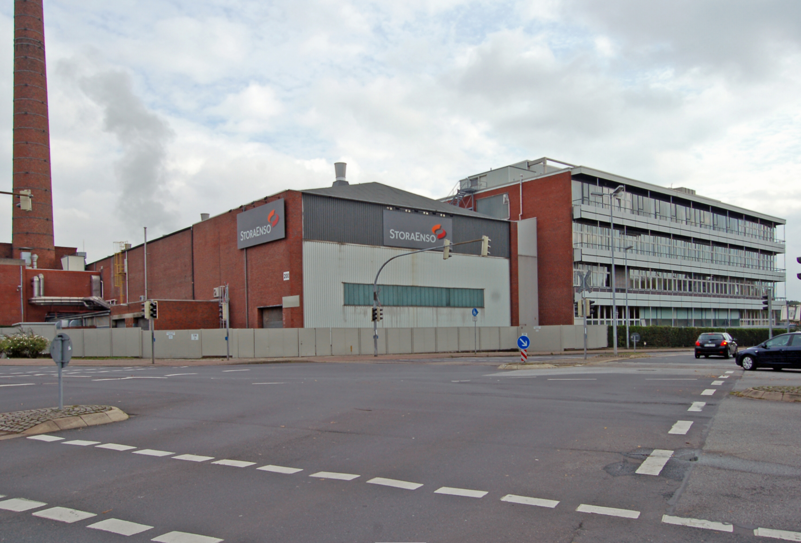 Die StoraEnso Paperfabrik in Uetersen.